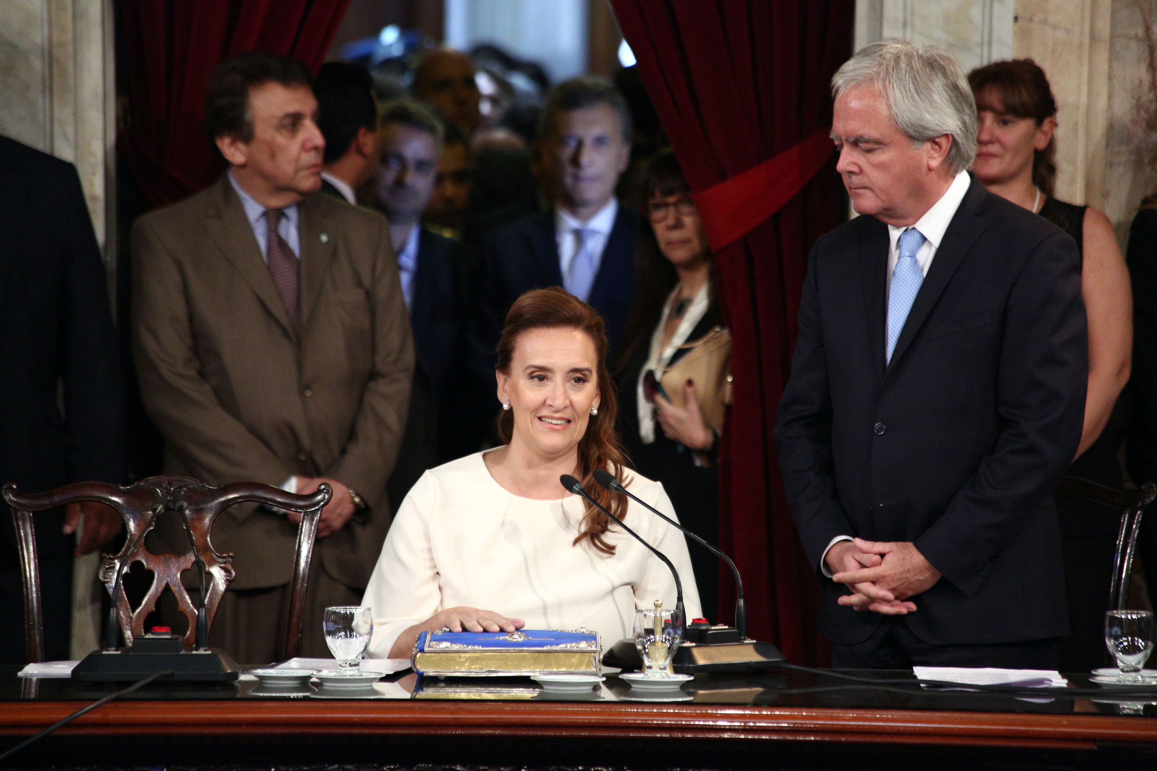 Jura de Mauricio Macri y Gabriela Michetti en el Congreso